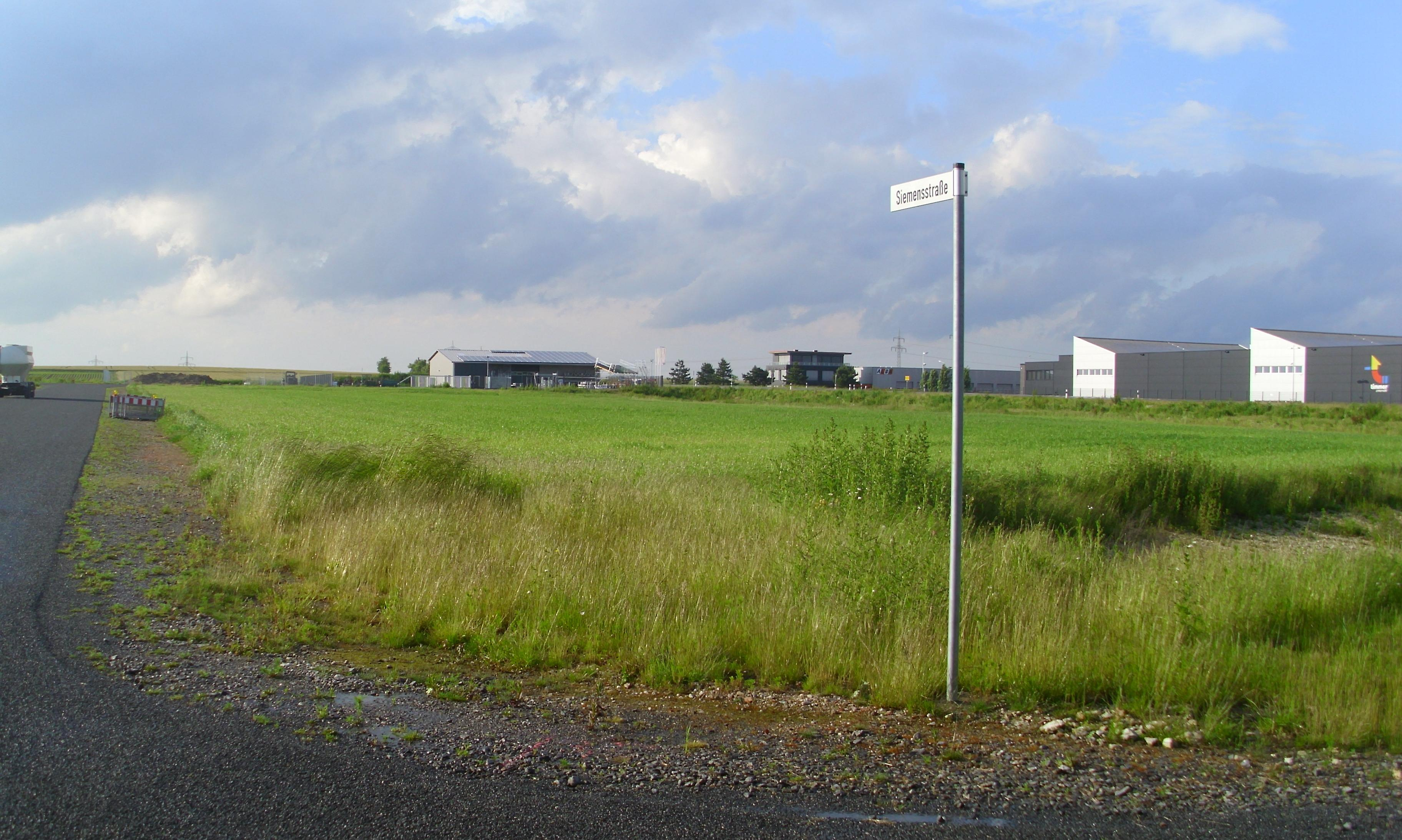 Gewerbegebiet Neuenkirchen-Nord (Kreis Steinfurt) vierte Erweiterung (72000 qm), Siemensstraße